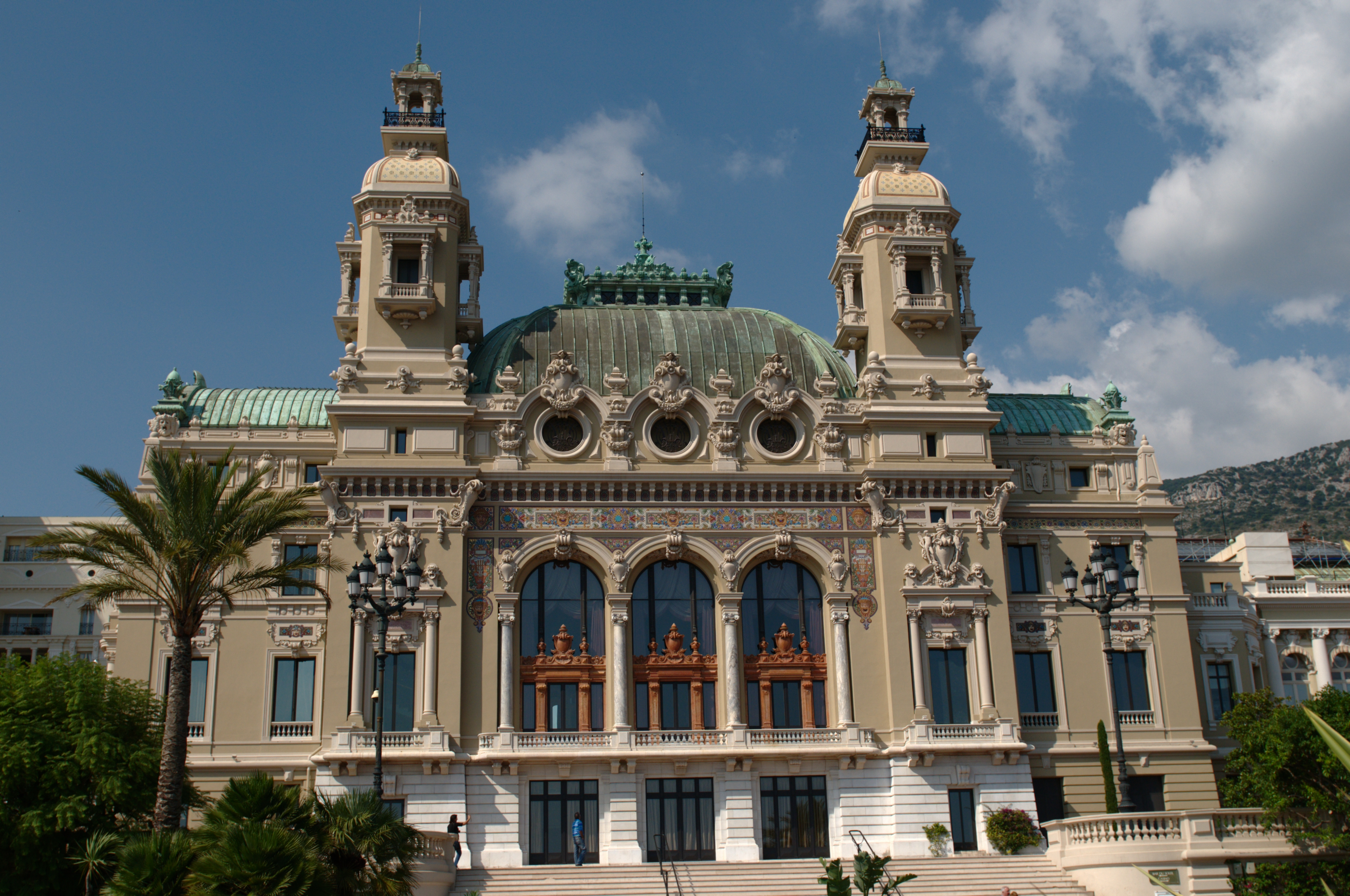 Casino de Monaco, coté mer